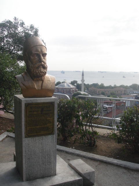 Sultanahmet Endüstri Meslek Lisesi'nin bahçesinde Mithat Paşa'nın büstü